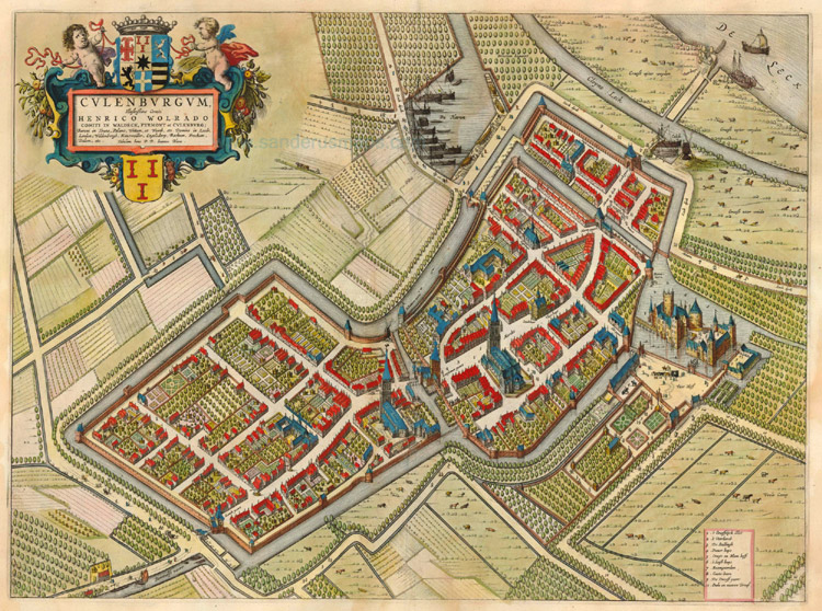 title: Culenburgum; size: 38 x 52